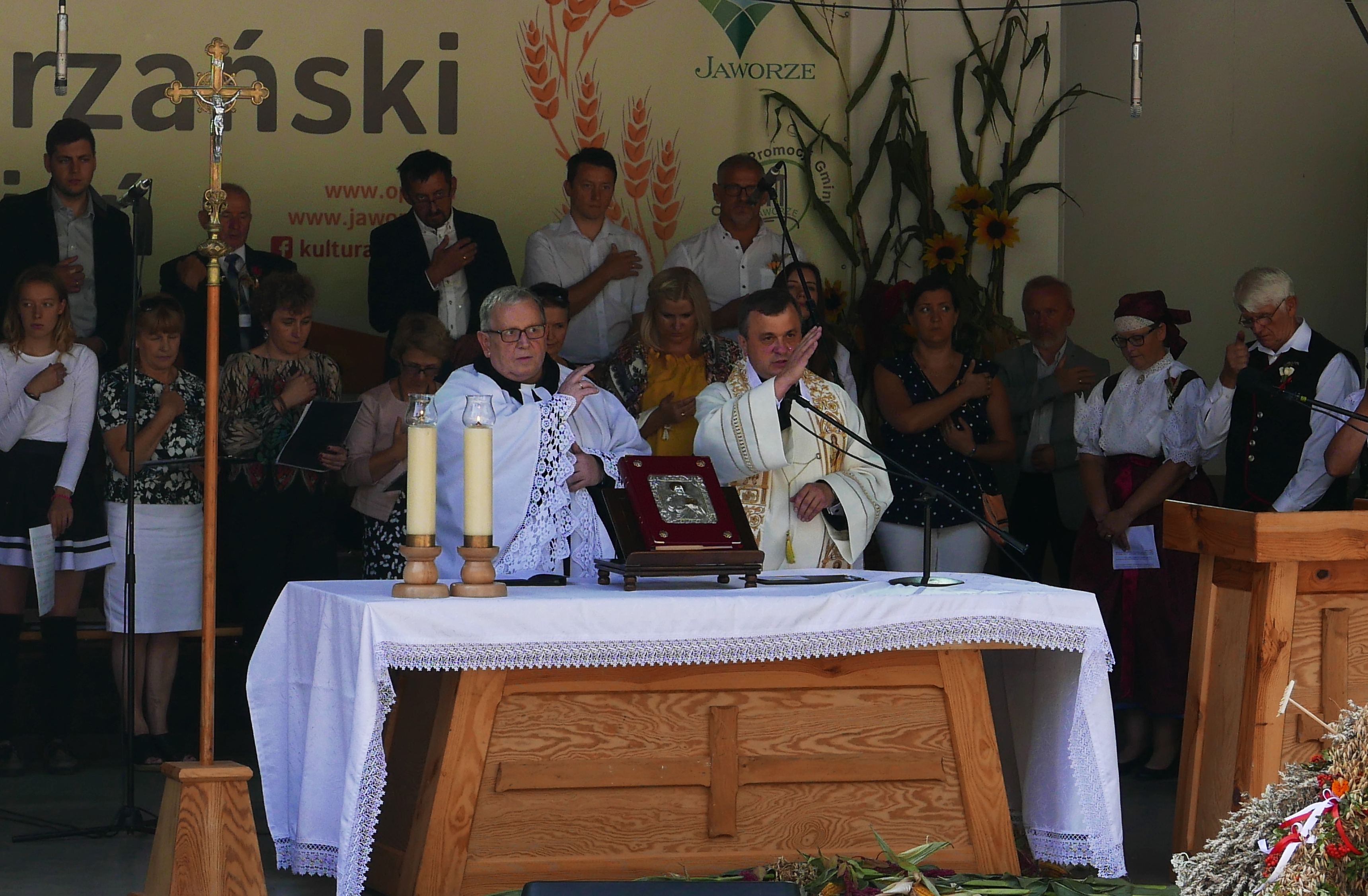 Nabożeństwo ekumeniczne celebrowane przez przedstawicieli Kościołów rzymsko-katolickiego i ewangelickiego w Jaworzu na Śląsku Cieszyńskim z okazji dożynek w 2018 roku. Proboszcz katolicki ks. Stanisław Filapek i proboszcz luterański ks. Władysław Wantulok.